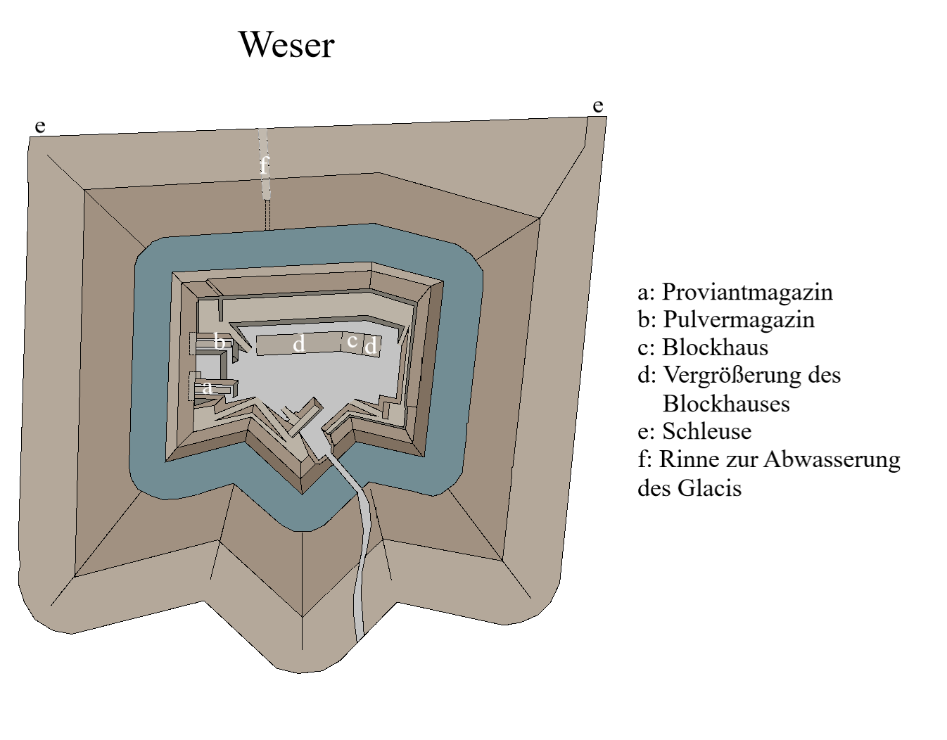 Plan der Blexer Schanze, Rechtschreibung mit "ß"